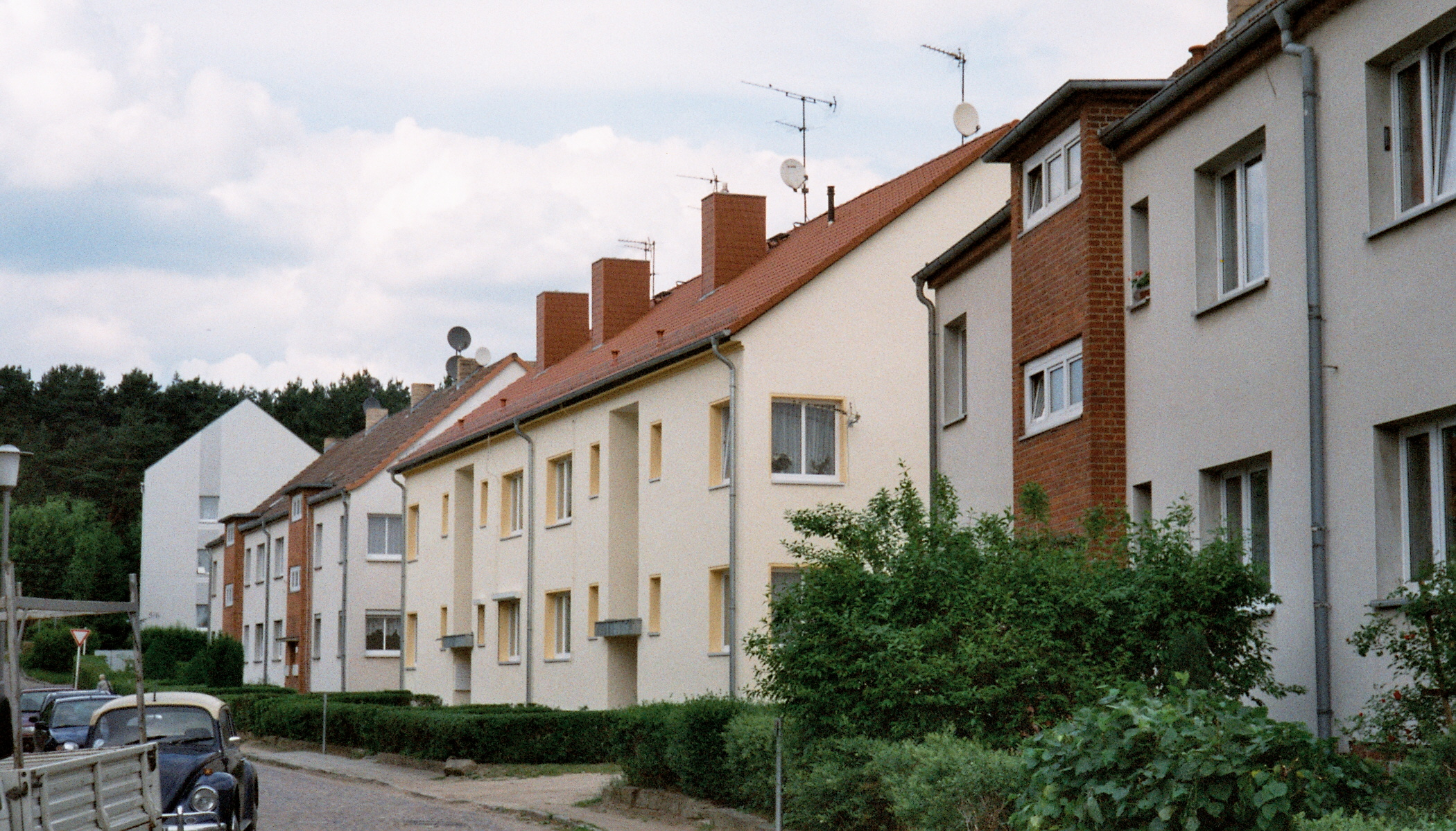 Wohnungsbaugenossenschaft (WBG) „Aufbau“ Strausberg eG: Häuser der ehemaligen „GEWOBA Strausberg“ (vormals „Beamtenwohnungsverein zu Strausberg“) in der Bruno-Bürgel-Straße